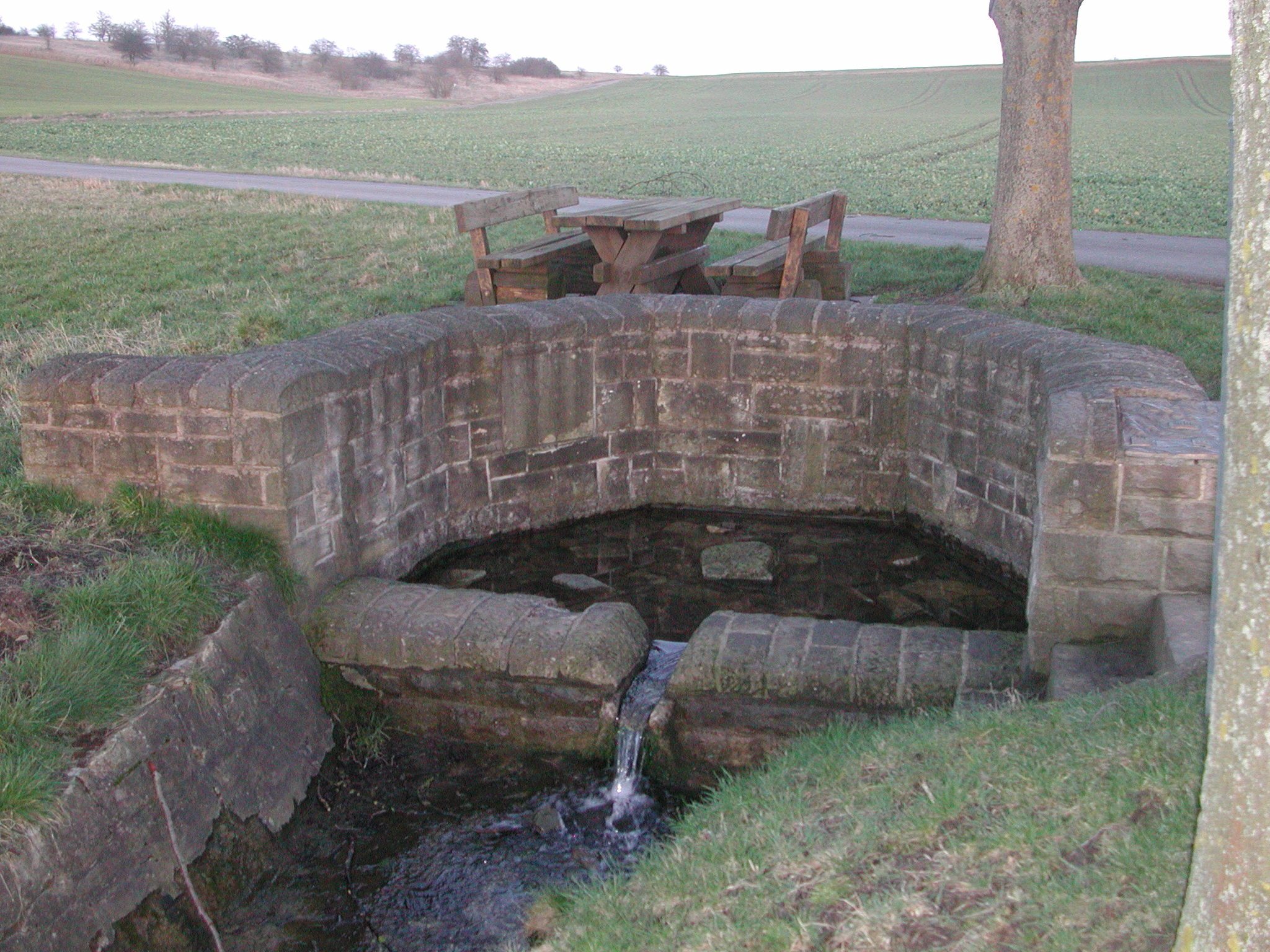 Gefasste Quelle der Fränkischen Saale in der Nähe von Alsleben, Grabfeld